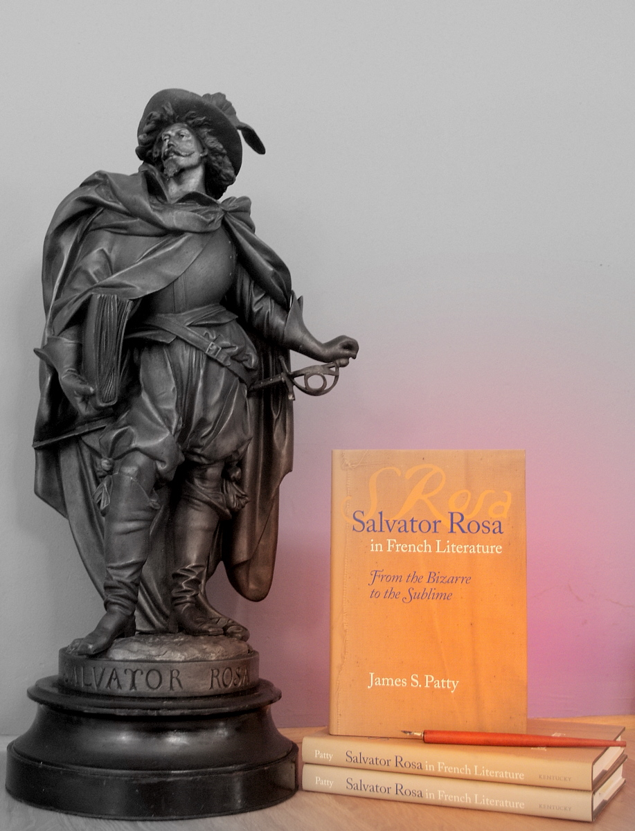 Statue de Salvator Rosa par Carrier Belleuse 1860 Livre de James Patty 2004